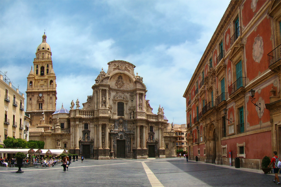 Plaza del Cardenal Belluga, Murcia, Región de Murcia, España.